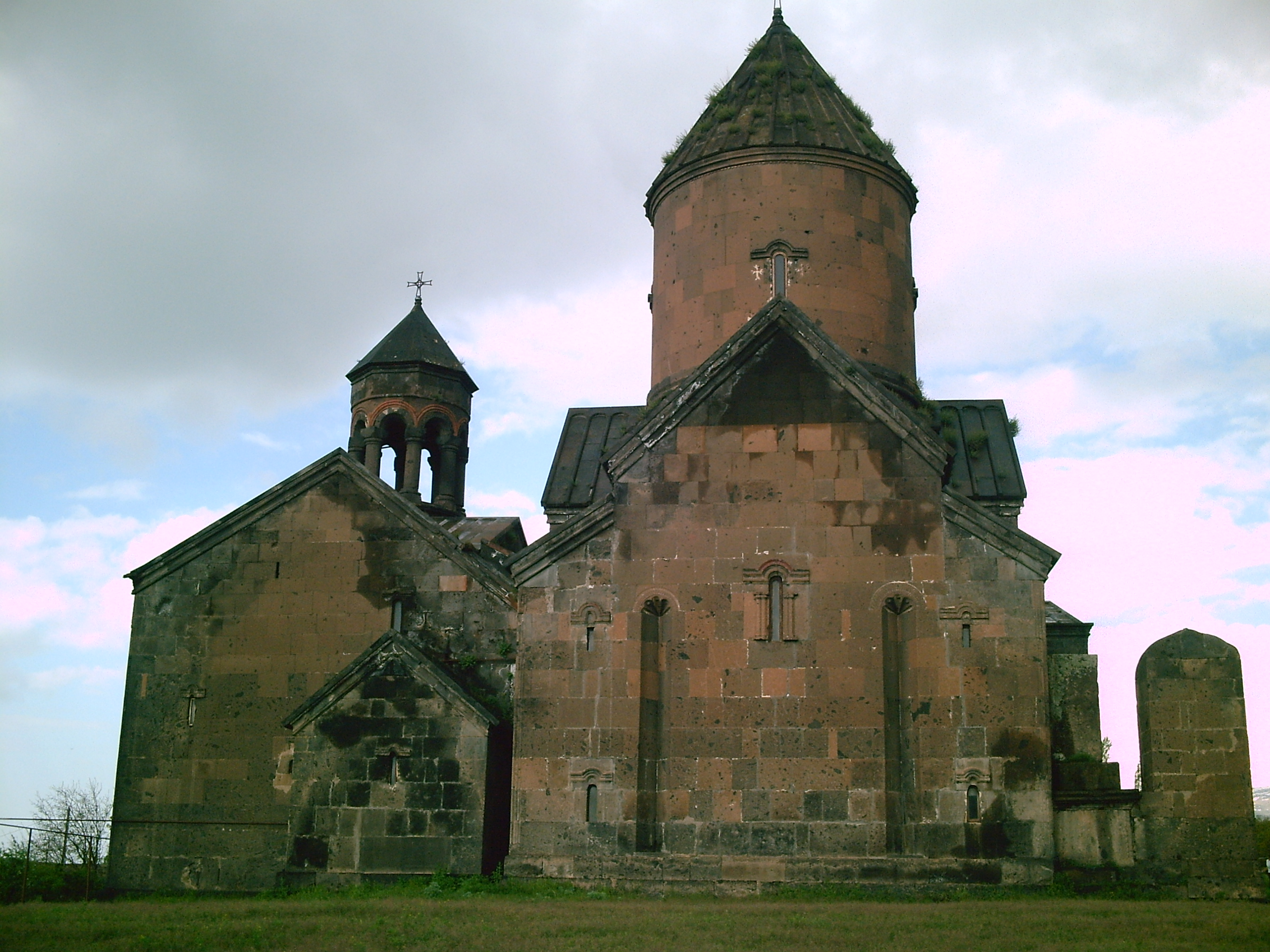 Վանական համալիր Սաղմոսավանք, 13-18 դդ. 93/4